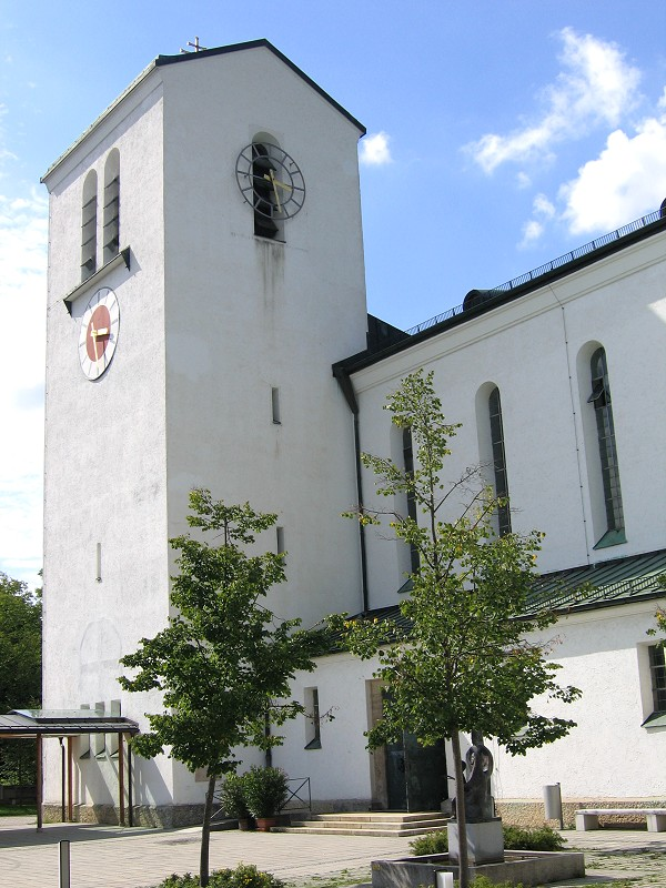 Kirche Heilige Familie, Muenchen-Harlaching